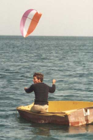 1984 - Premier test de traction d'un C-kite par les frères Legaignoux